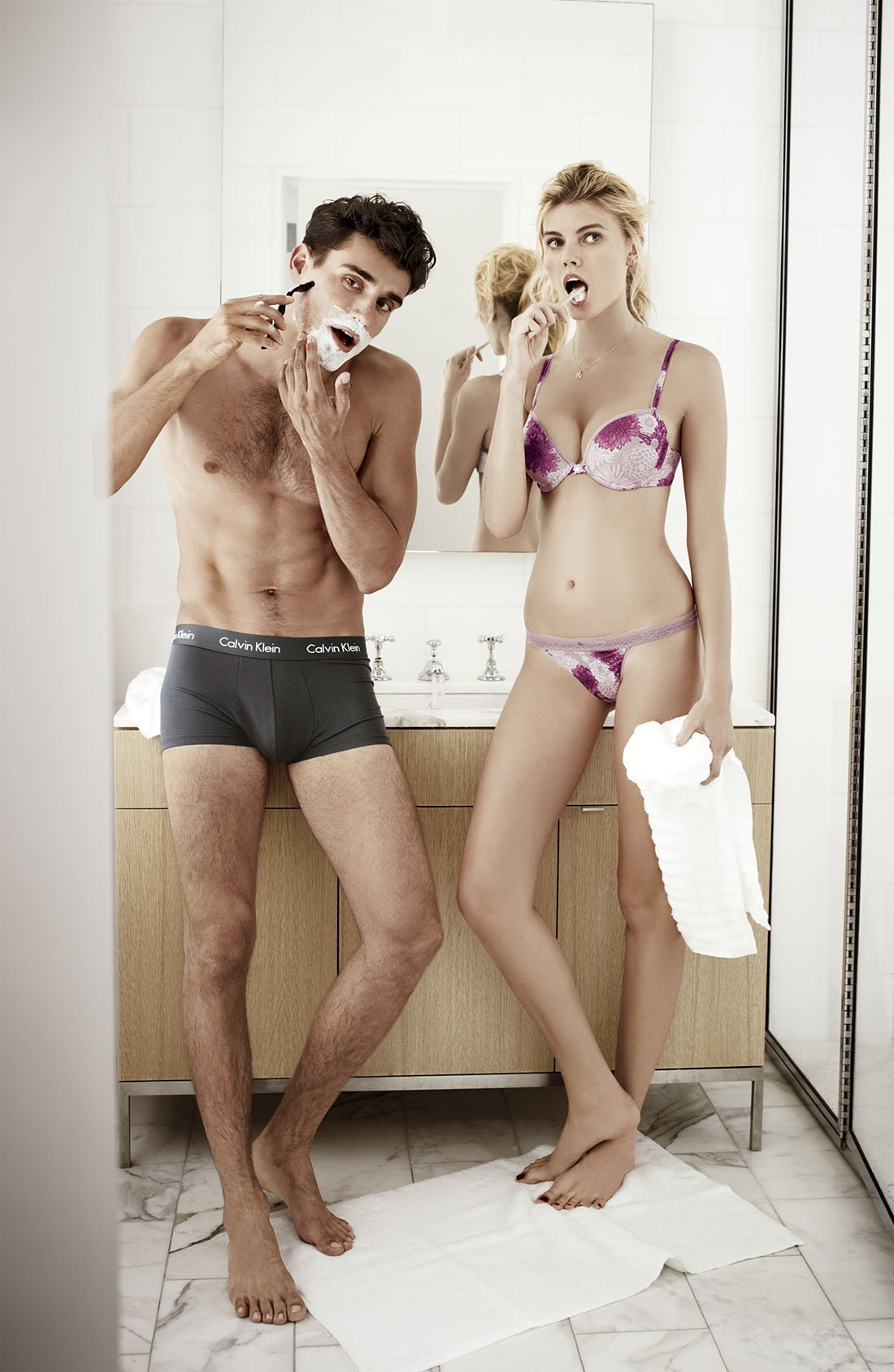 Артур Кульков рекламирует бренд одежды "Calvin Klein"